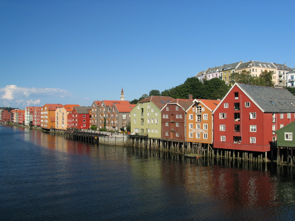 Bakklandet in Trondheim